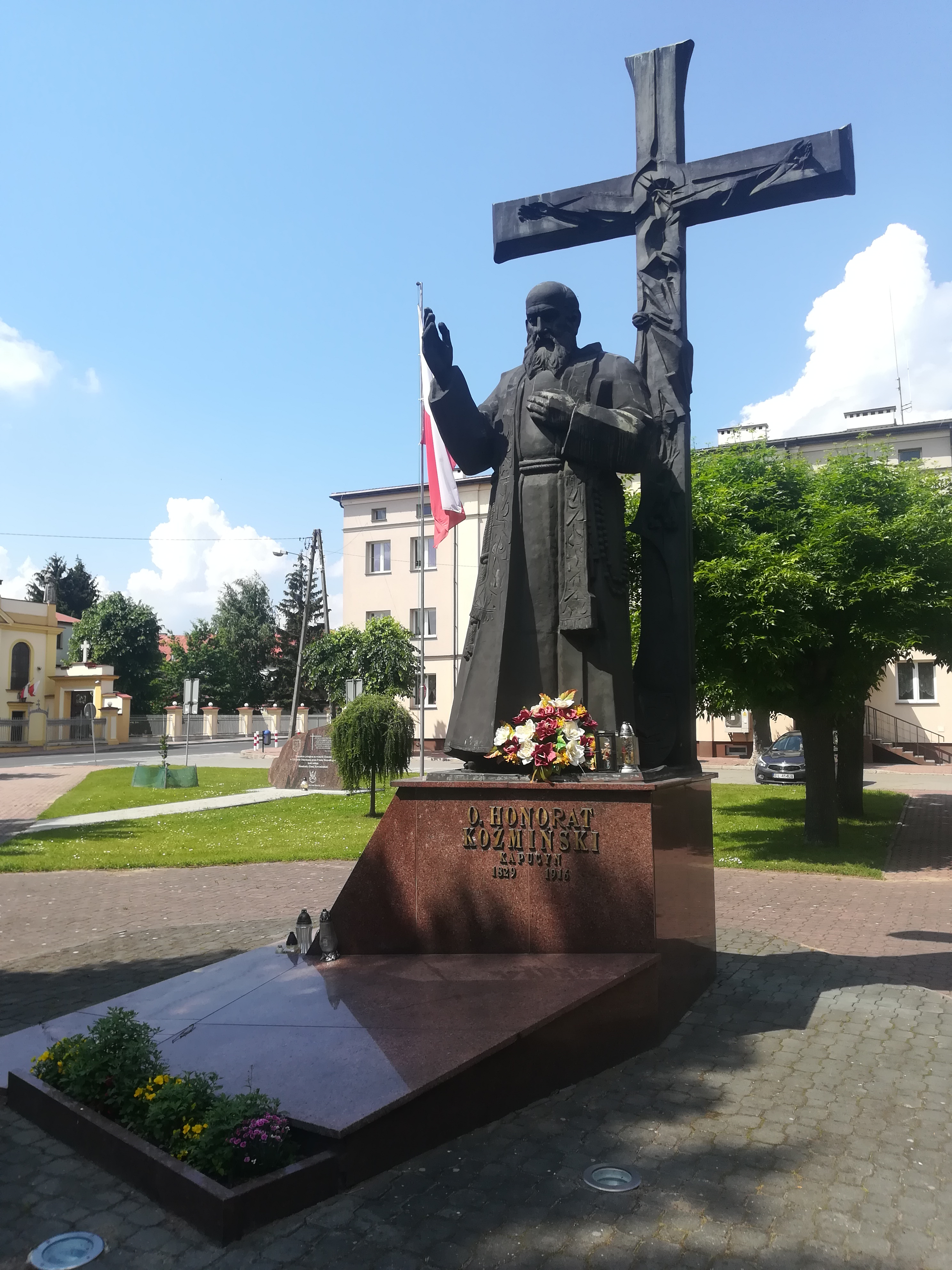 Widok z rynku w Nowym Mieście nad Pilicą.